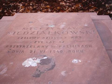 Palmiry